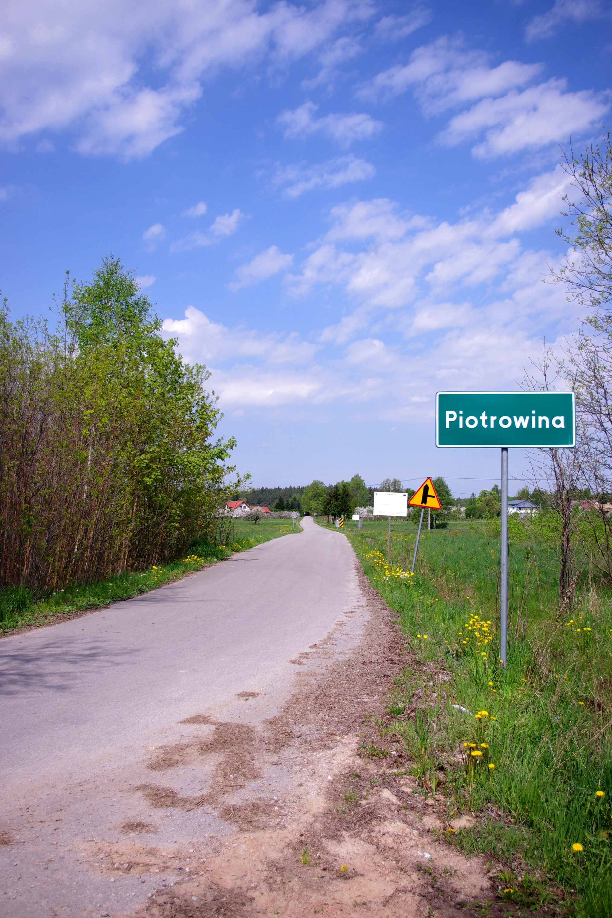 Wieś Piotrowina w gminie Kałuszyn, w powiecie mińskim